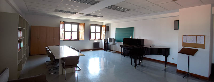 Aula 19 del Conservatorio Superior de Música Eduardo Martínez Torner. Oviedo. España